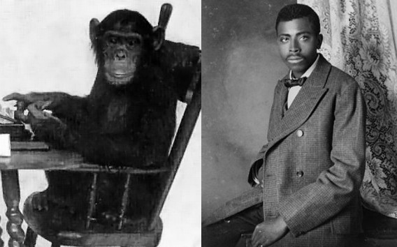 Illustration de la déshumanisation animaliste. Sur cette image une personne de couleur de peau noire est comparée à un singe.